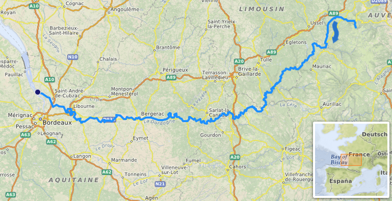 carte réalisée sur umap This map may be incomplete, and may contain errors. Don't rely solely on it for navigation.